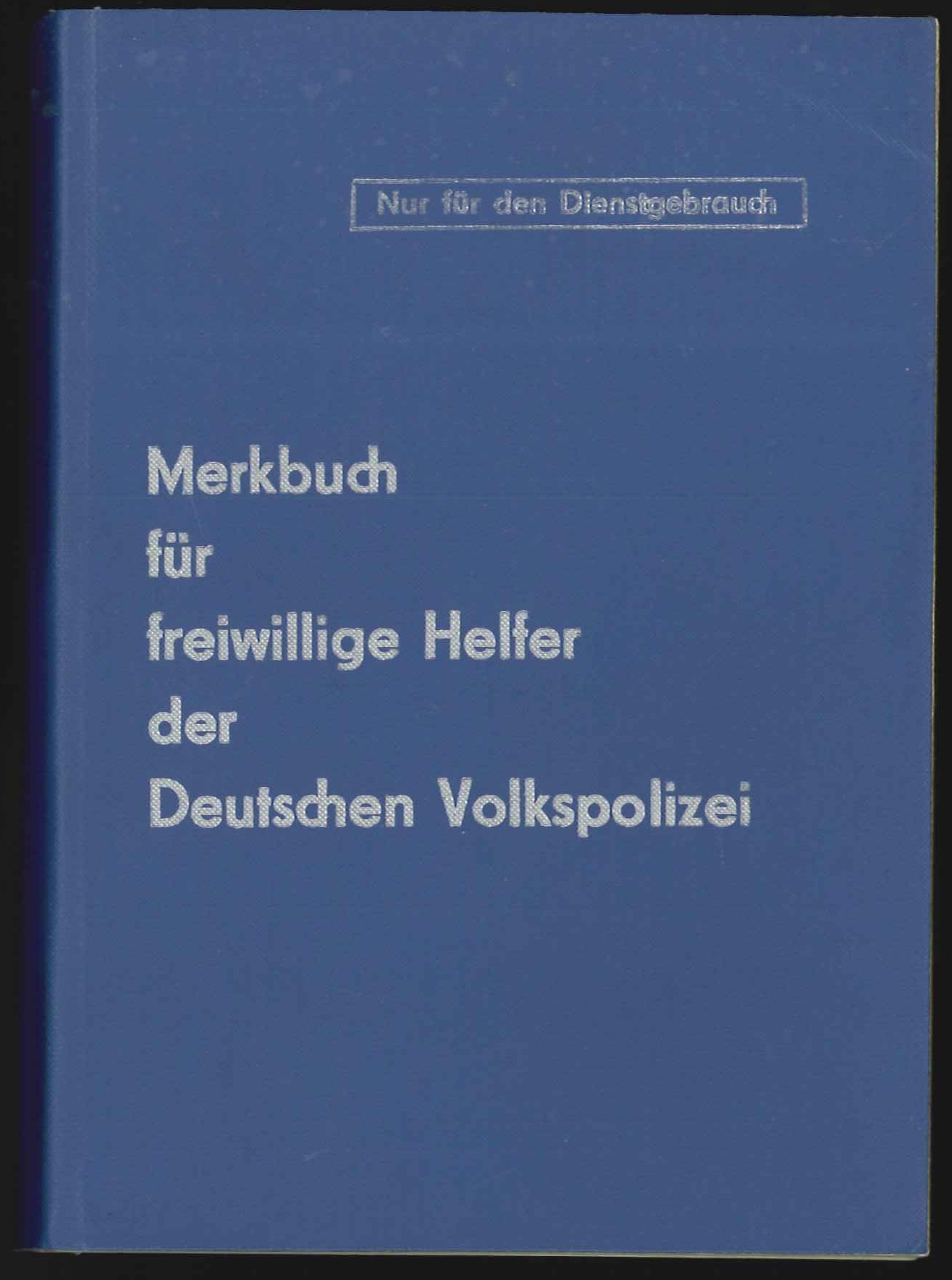 Merbuch freiwilliger Helfer der Volkspolizei (Amtliches Werk)